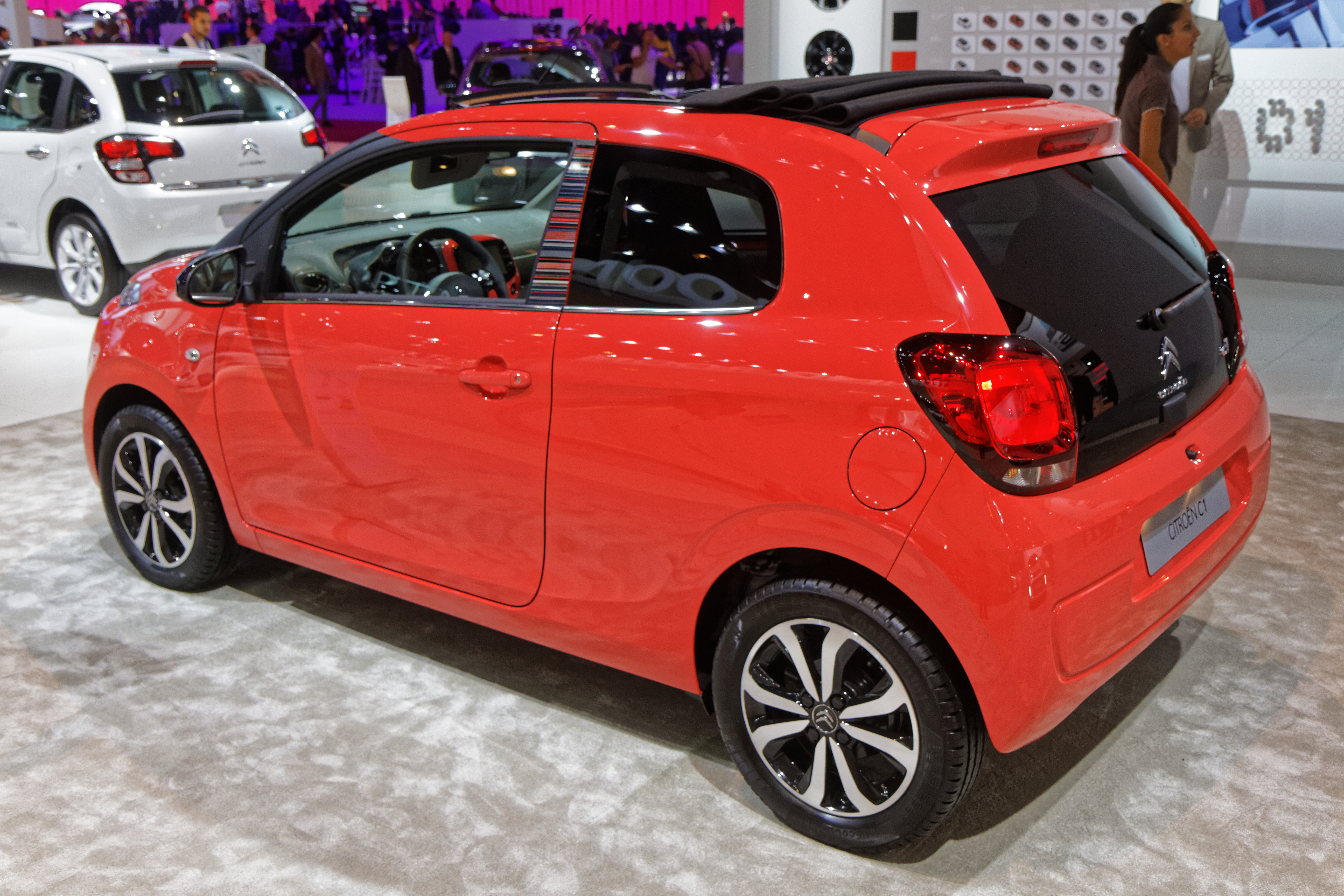 Une Citroën C1 présentée lors du mondial de l'automobile de Paris 2014.